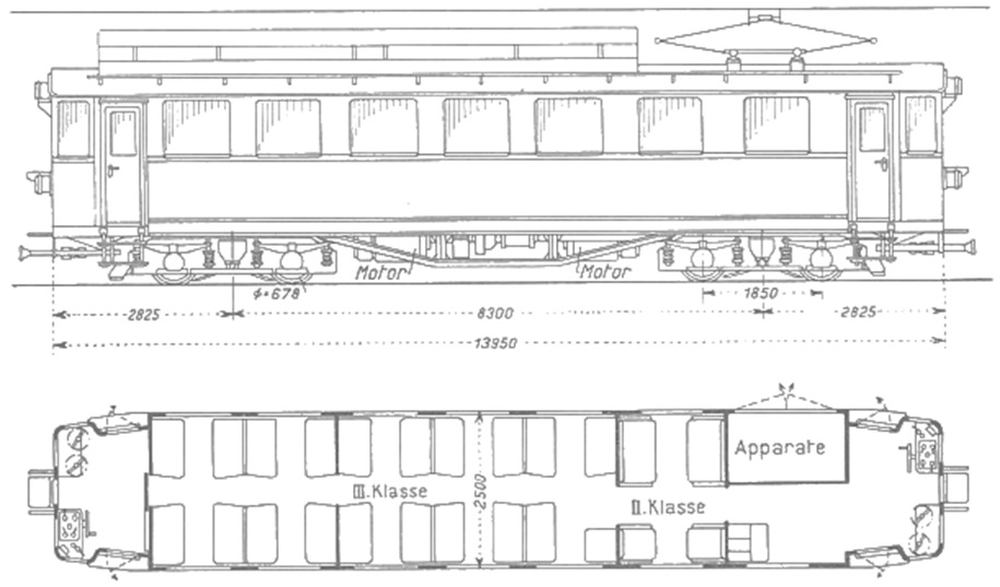 SGA BCFeh 4/4: Typenskizze